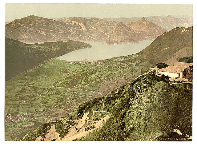 Das Stanserhorn mit der alten Standseilbahn, Stans und dem Vierwaldstättersee um 1900 * Quelle: * Public Domain